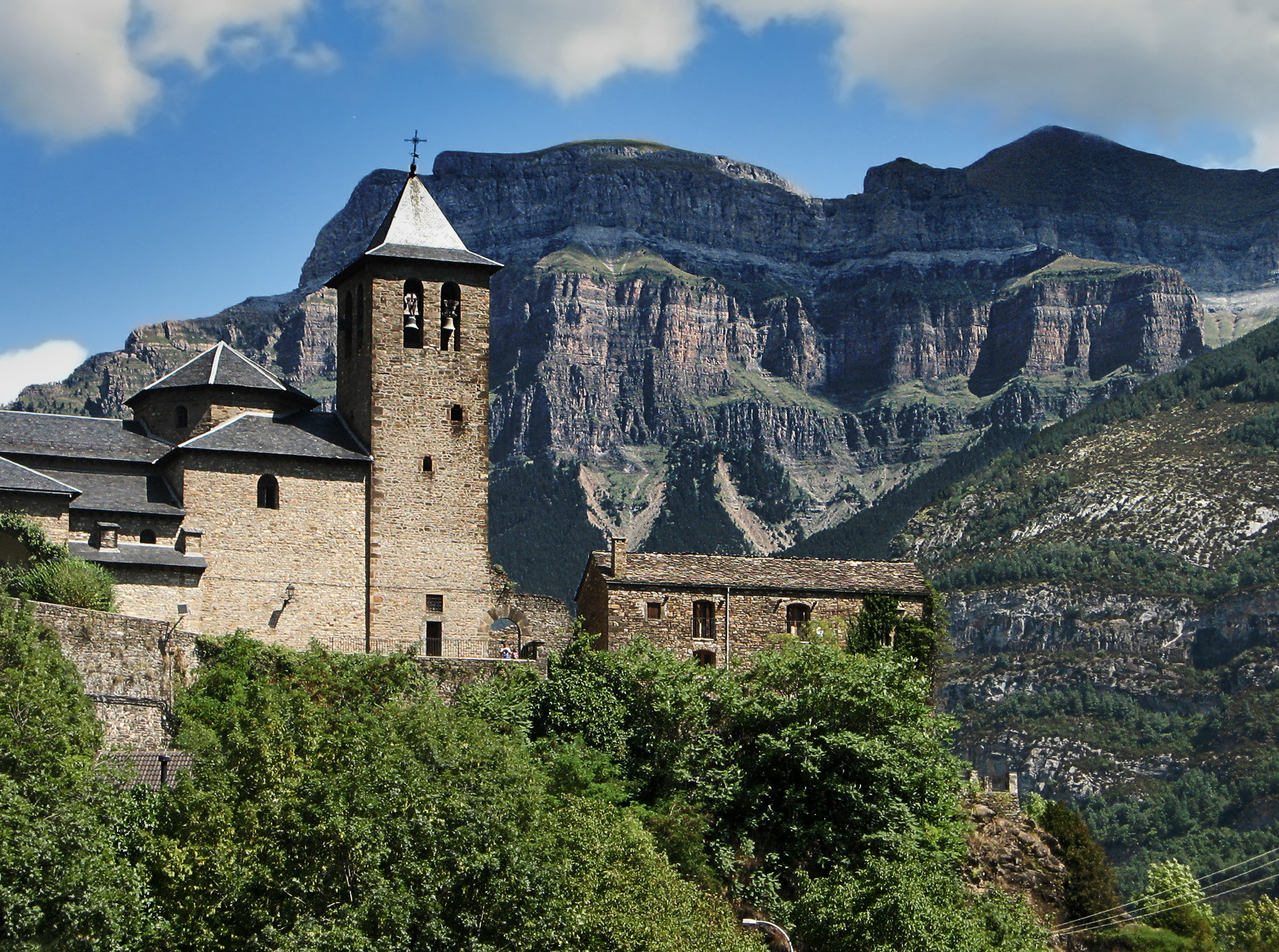 Torla, puerta de entrada al Parque Nacional de Ordesa y Monte Perdido This is a photography of a Site of Community Importance in Spain with the ID: ES0000016. Natura2000 entry, EEA entry